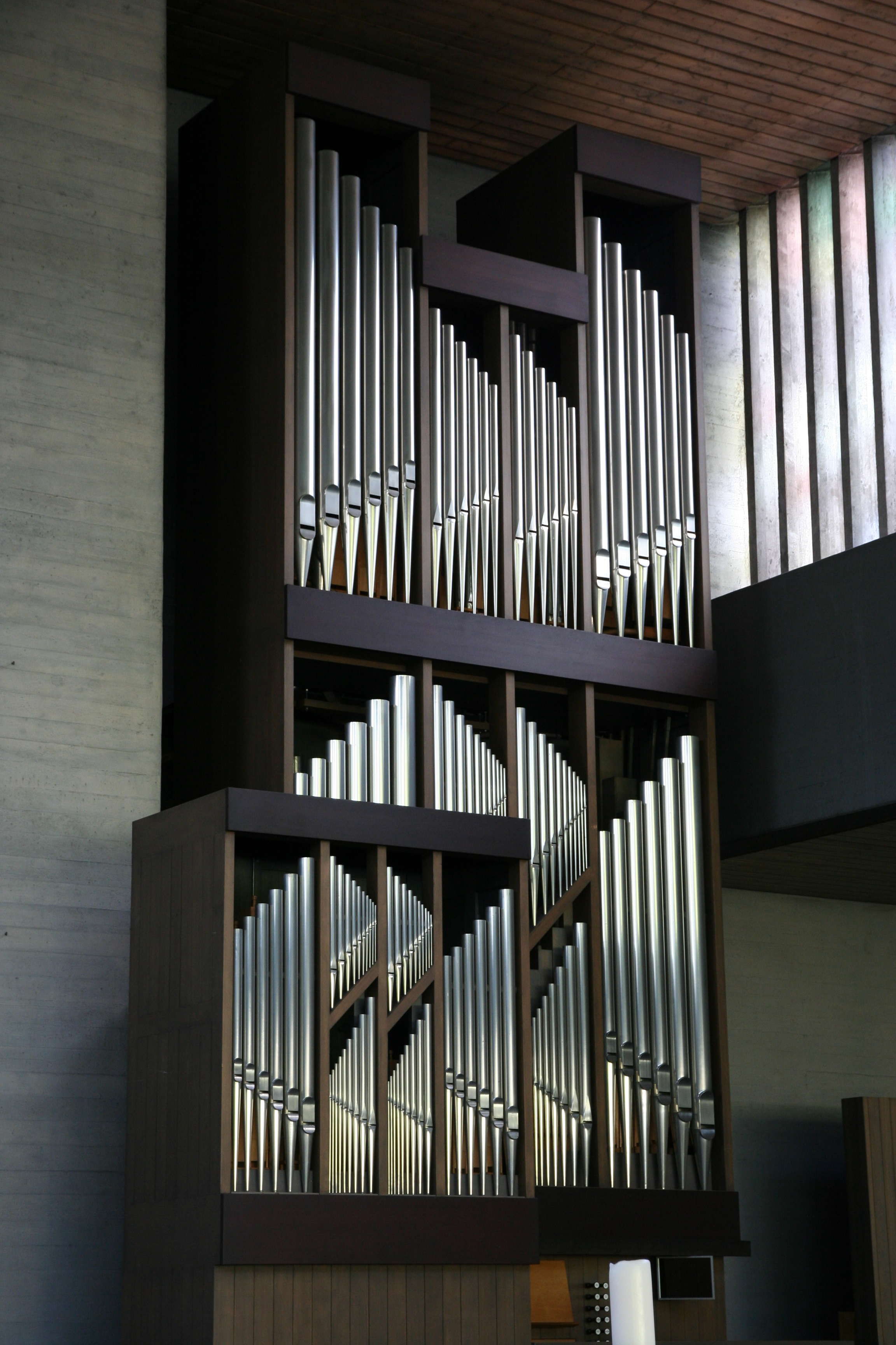 Römisch-katholische Pfarrkirche St. Marien Langnau ZH